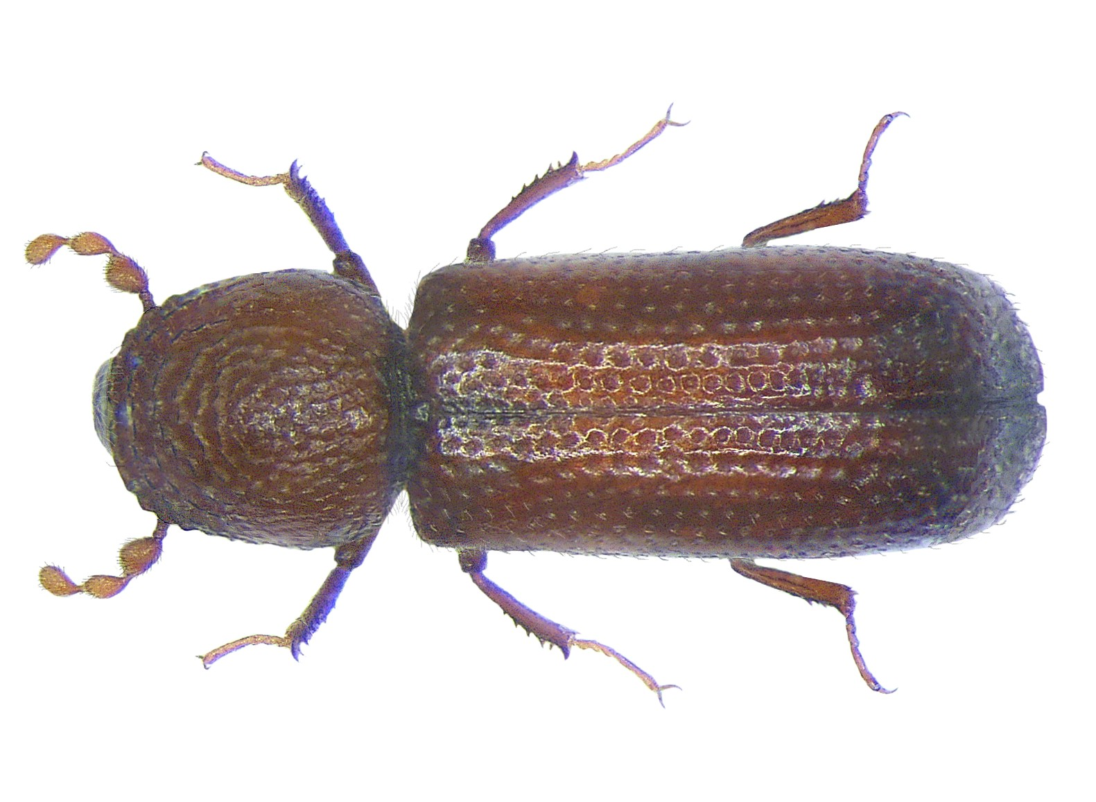 Rhyzopertha dominica Fabricius, 1792 Familie: Bostrichidae Grösse: 2-3 mm Verbreitung: kosmopolitisch Ökologie: Entwicklung in Pflanzenprodukten (Vorratsschädling) Fundort: Germania, Bayern, Kulmbach leg. 2007; det. U.Schmidt, 2007 Foto: U.Schmidt, 2007